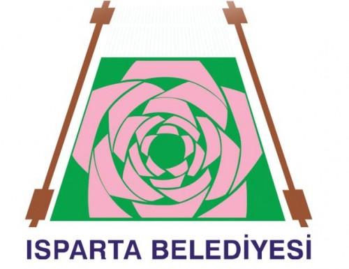 Isparta Belediyesi